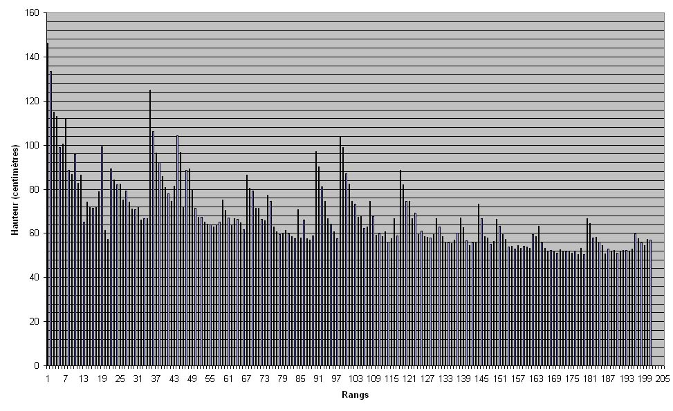 Représentation graphique de l'évolution de la hauteur des rangs d'assises de la pyramide de Khéops d'après les mesures effectuées par Petrie au coin sud-ouest